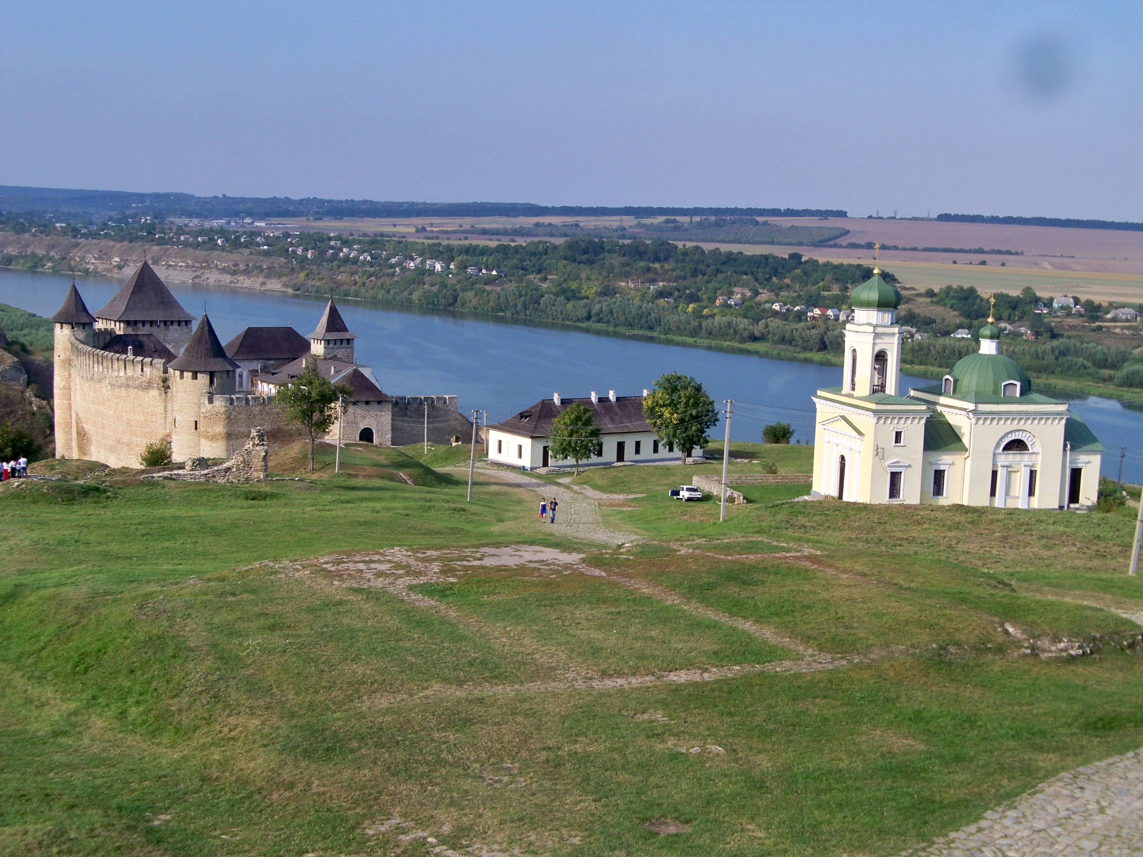 Хотинська фортеця, м. Хотин, Державний історико-архітектурний заповідник «Хотинська фортеця»